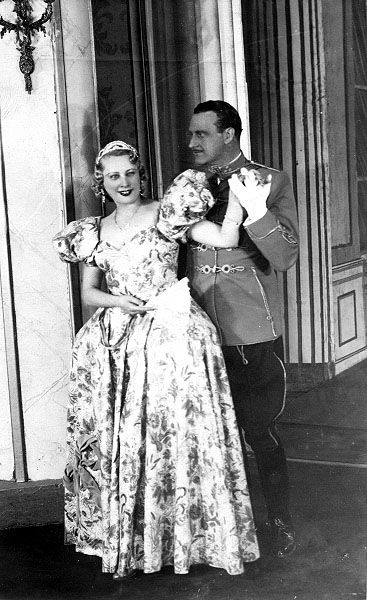 Szirmai Albert: A balerina. Király Színház, 1931. Honthy Hanna (Mici) és Kertész Dezső (Máriássy László, főhadnagy).